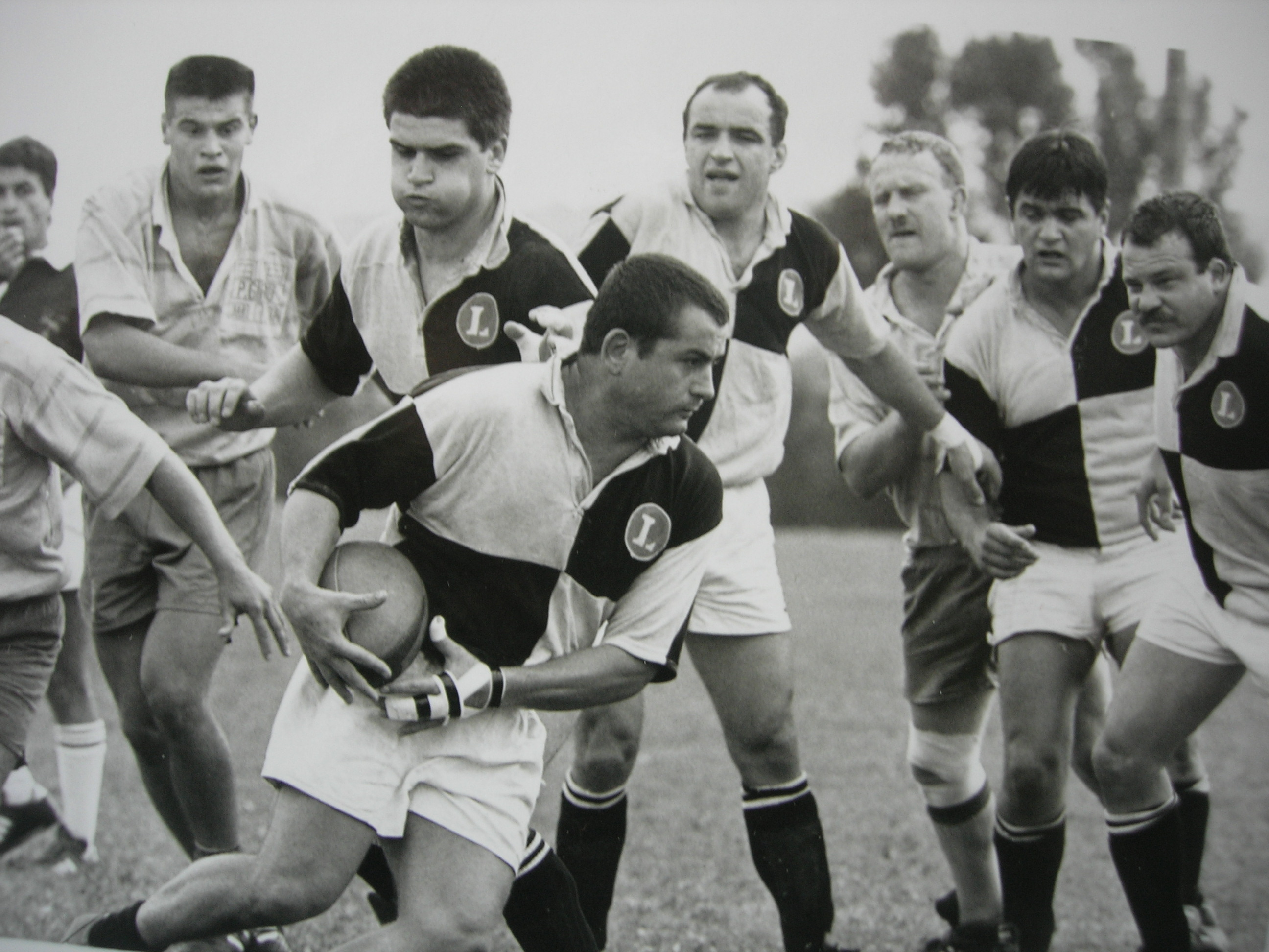 USFL Année 1990